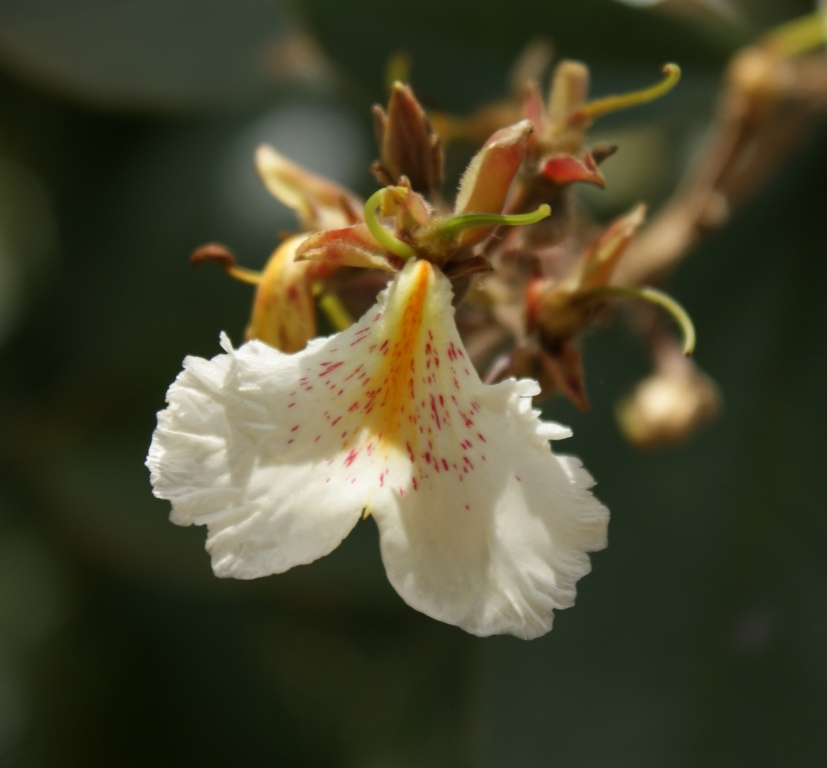 Qualea multiflora - VOCHYSIACEAE Jardim Botânico de Brasília - Distrito Federal - Brasil.